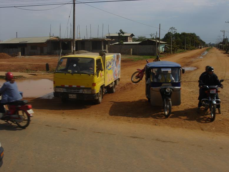 Random picture from Puerto Maldonado